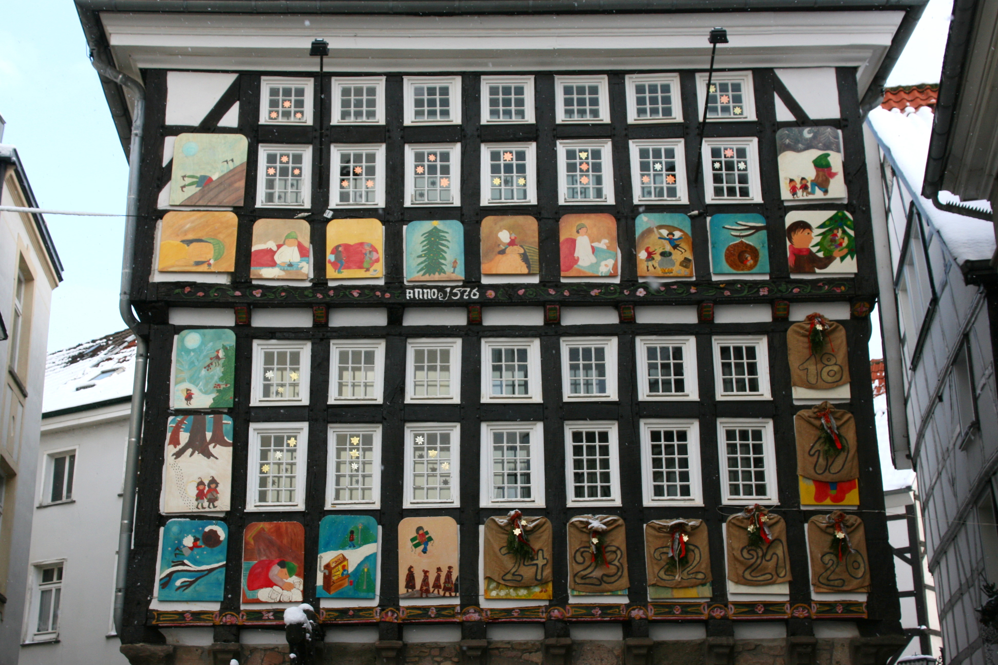 Altes Rathaus am Untermarkt in Hattingen